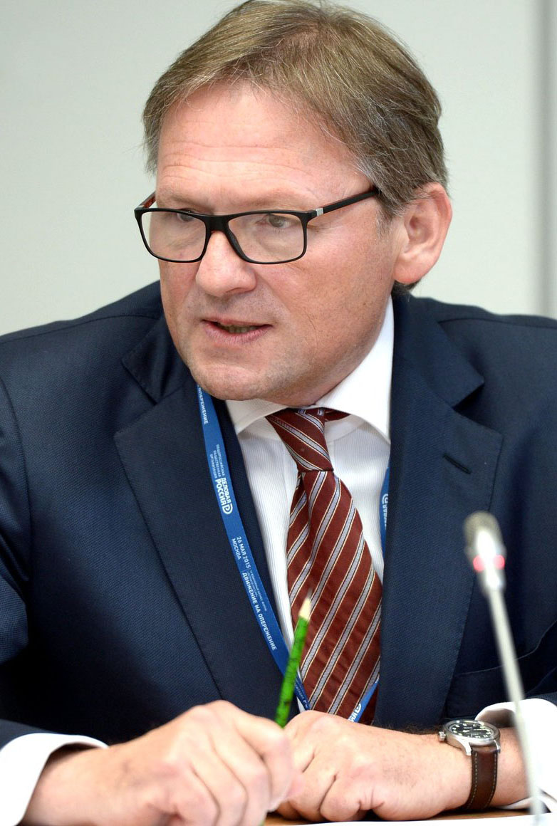 Уполномоченный по защите прав предпринимателей Борис Титов